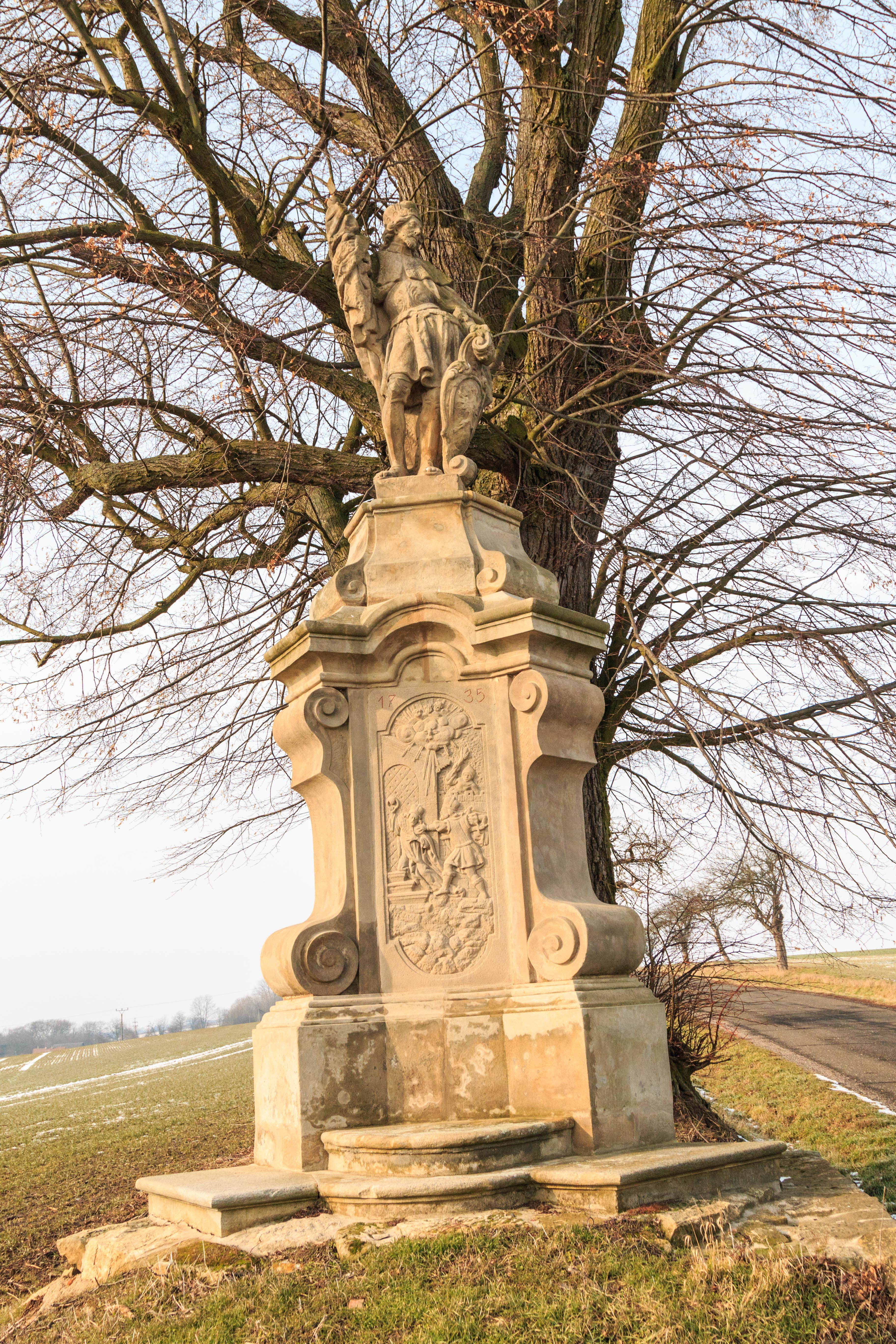 Socha svatého Václava, rozcestí státní silnice, Bartoušov (Jičíněves).